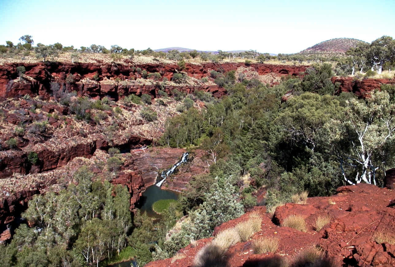 Karijini NP, Dales Gorge